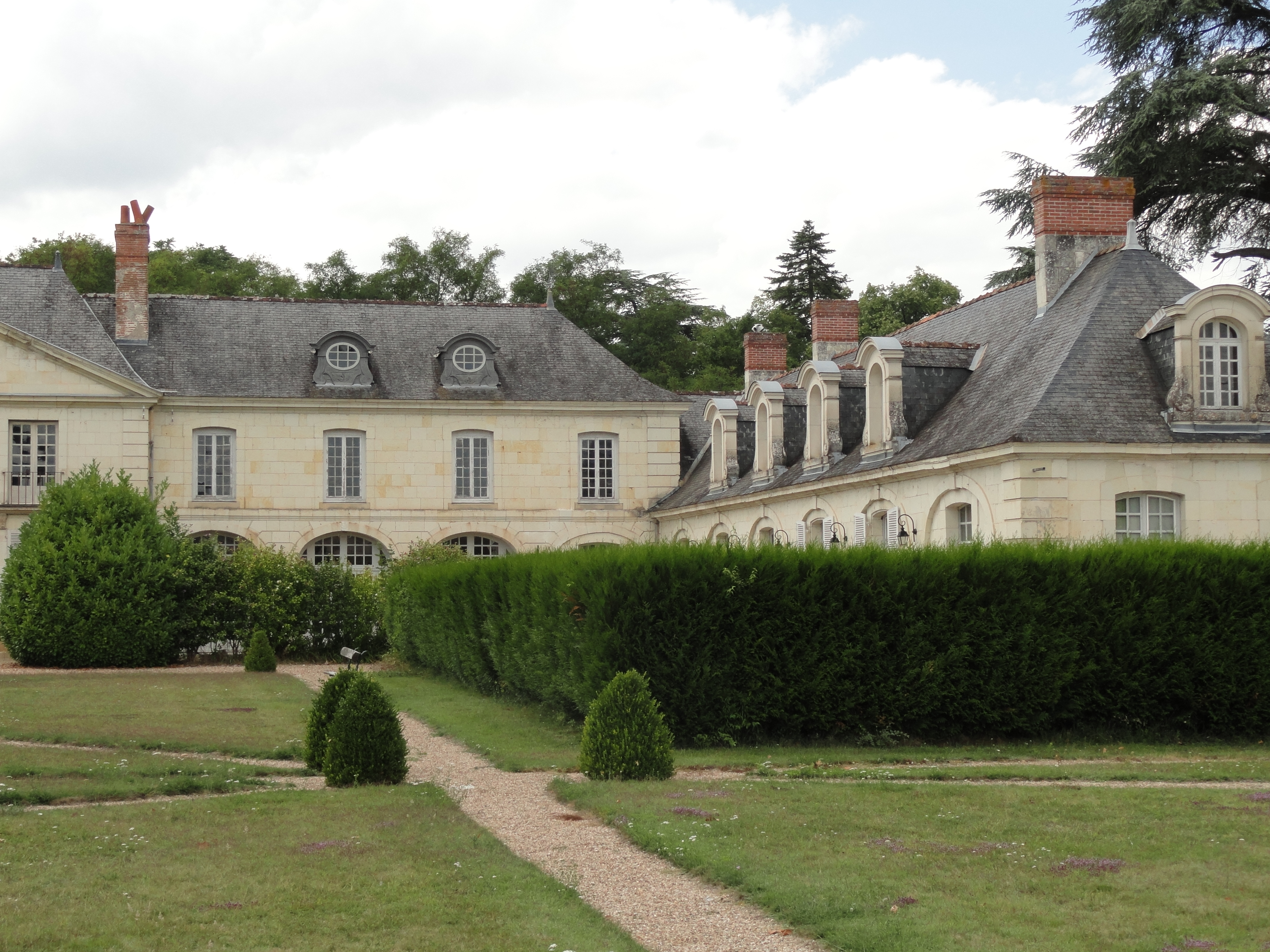 chateau des ormes